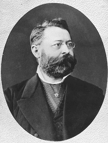 Paulay Ede (1836–1894) színész, rendező, 1878–1894 között a Nemzeti Színház igazgatója az 1880-as években